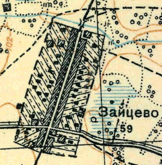 Топографическая карта Ленинградской области, квадрат О-36-25-А-а (Лампово), деревня Зайцево